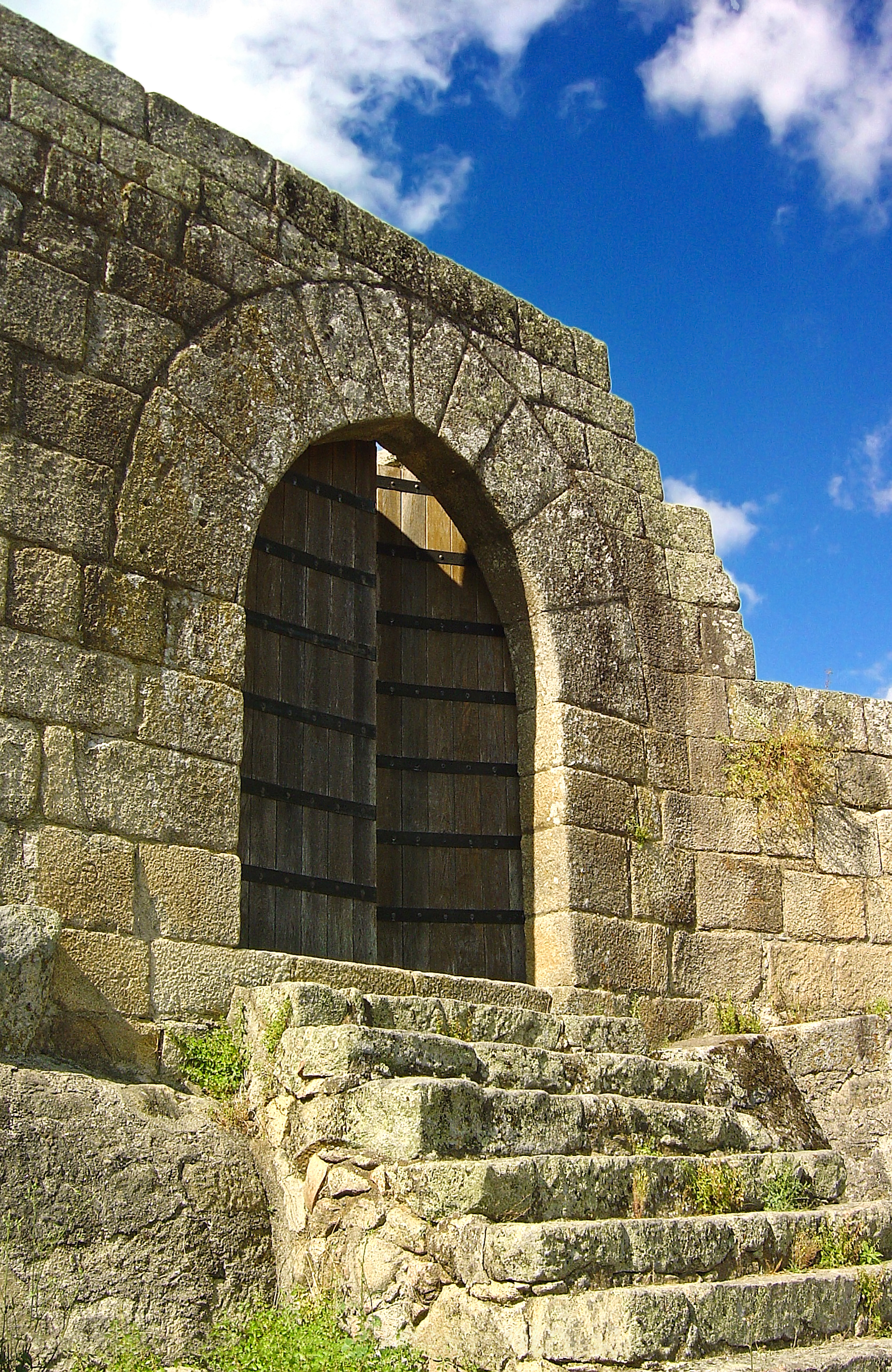 O lugar de Avô e seus domínios foram doados pelo Conde D. Henrique ao bispo de Coimbra. A sua fortificação, entretanto, é atribuída ao reinado de D. Afonso Henriques (1112-1185). A evolução histórica e arquitectónica do castelo requer maiores pesquisas. Em meados do século XIX a estrutura já estaria abandonada quando, em 1856, a sua cantaria foi reutilizada na construção da ponte de Ribeira de Moura. Posteriormente, particulares da região teriam prosseguido na utilização das antigas pedras, degradando inteiramente o monumento. O conjunto dos panos de muralhas remanescentes no castelo, que compreende as ruínas da Ermida de São Miguel em seu perímetro, foi classificado como Imóvel de Interesse Público por Decreto publicado em 25 de Outubro de 1963. See where this picture was taken. [?]